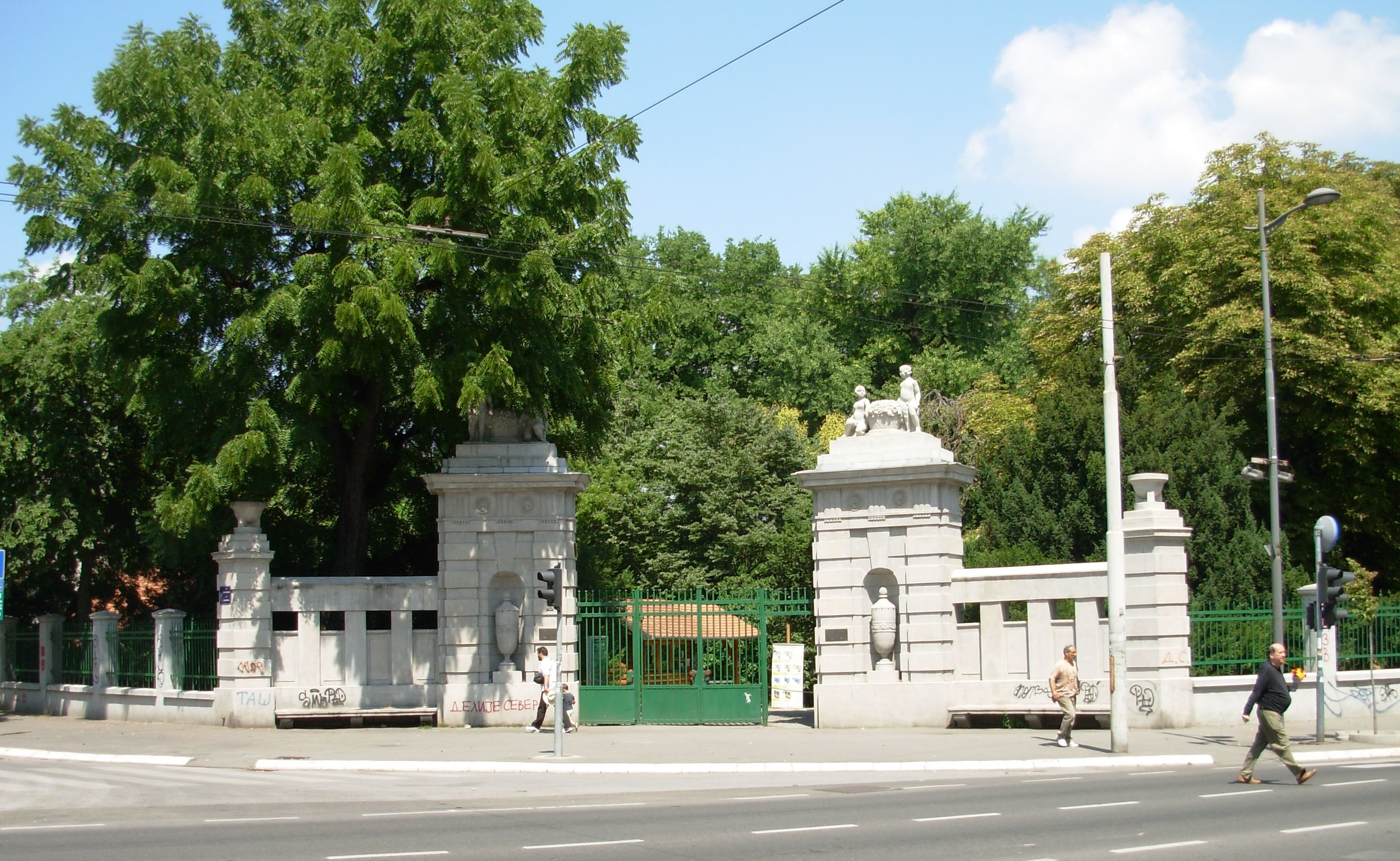 Botanička bašta "Jevremovac", Beograd, glavni ulaz. Slikao Goldfinger